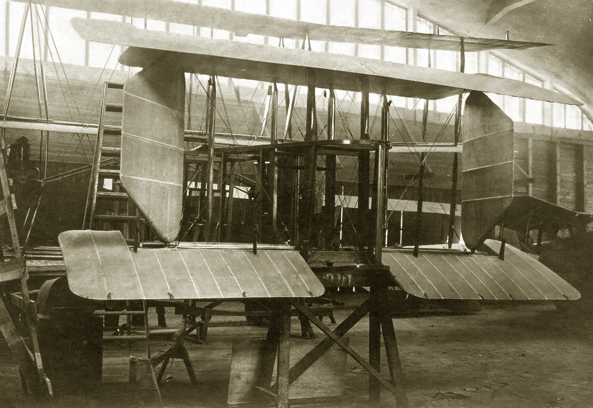 Один из цехов завода №39. Сборка триплан «КОМТА» 1921 г.